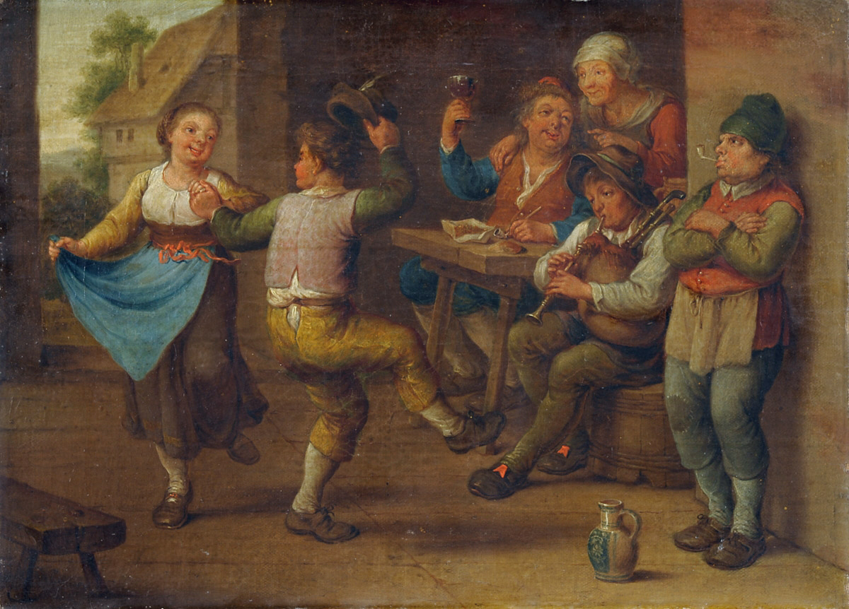 Feiernde Bauern. Öl auf Leinwand, 25,5 x 34,5 cm